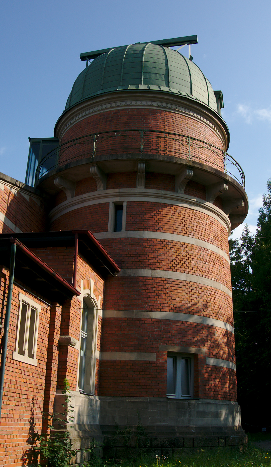 Zu sehen ist einer der beiden Türme der Dr.-Remeis-Sternwarte in Bamberg. Es handelt sich um den Westturm. Er hat ein drehbares Kuppeldach (grün), dass sich für astronomische Beobachtungen öffnen lässt.